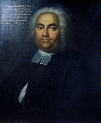 Prof. Daniel Maichel, Gemälde in der Tübinger Professoerngalerie